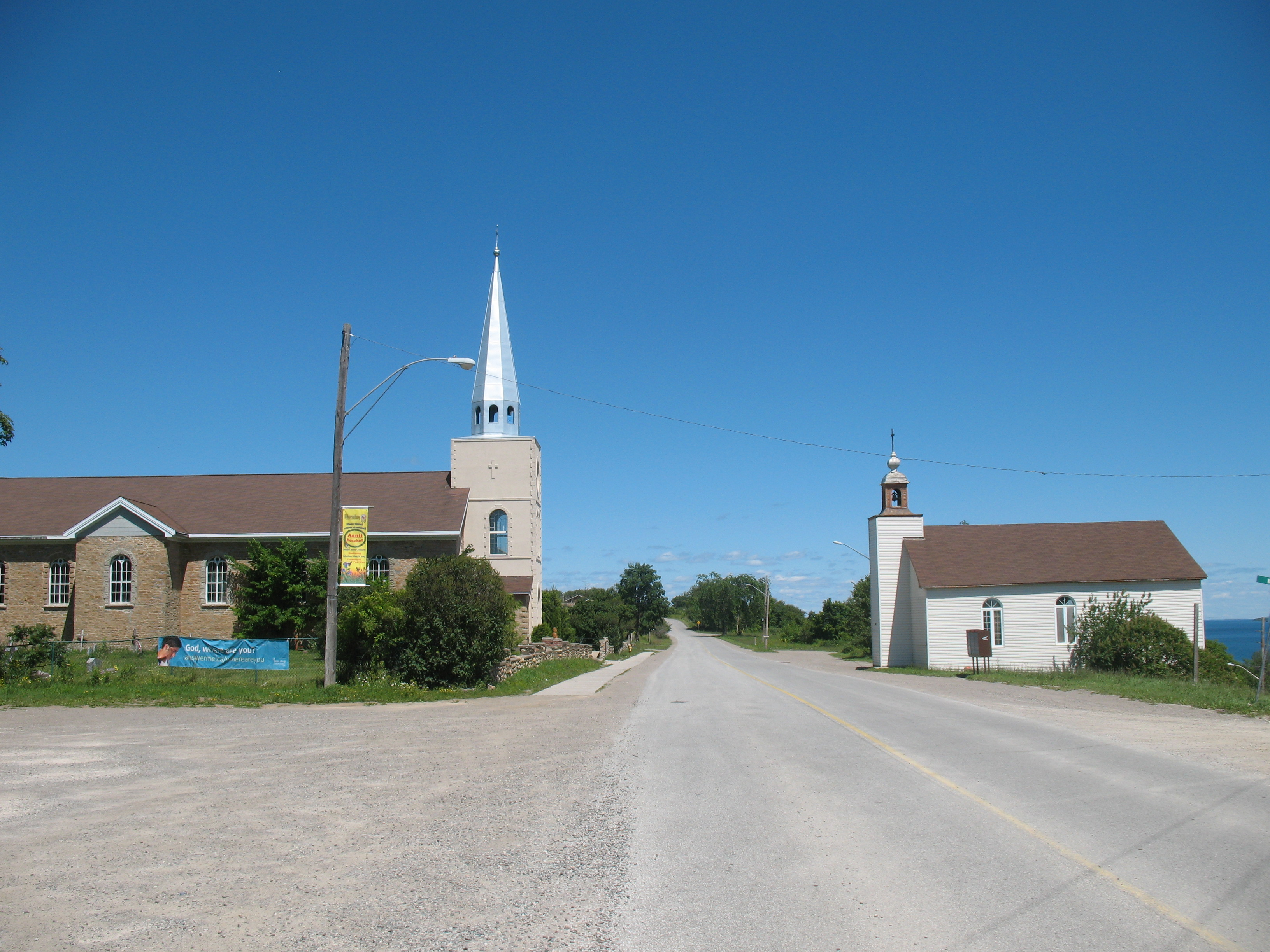 Die Kirchen in Wikwemikong, Manitoulin Island im Huronsee, Ontario